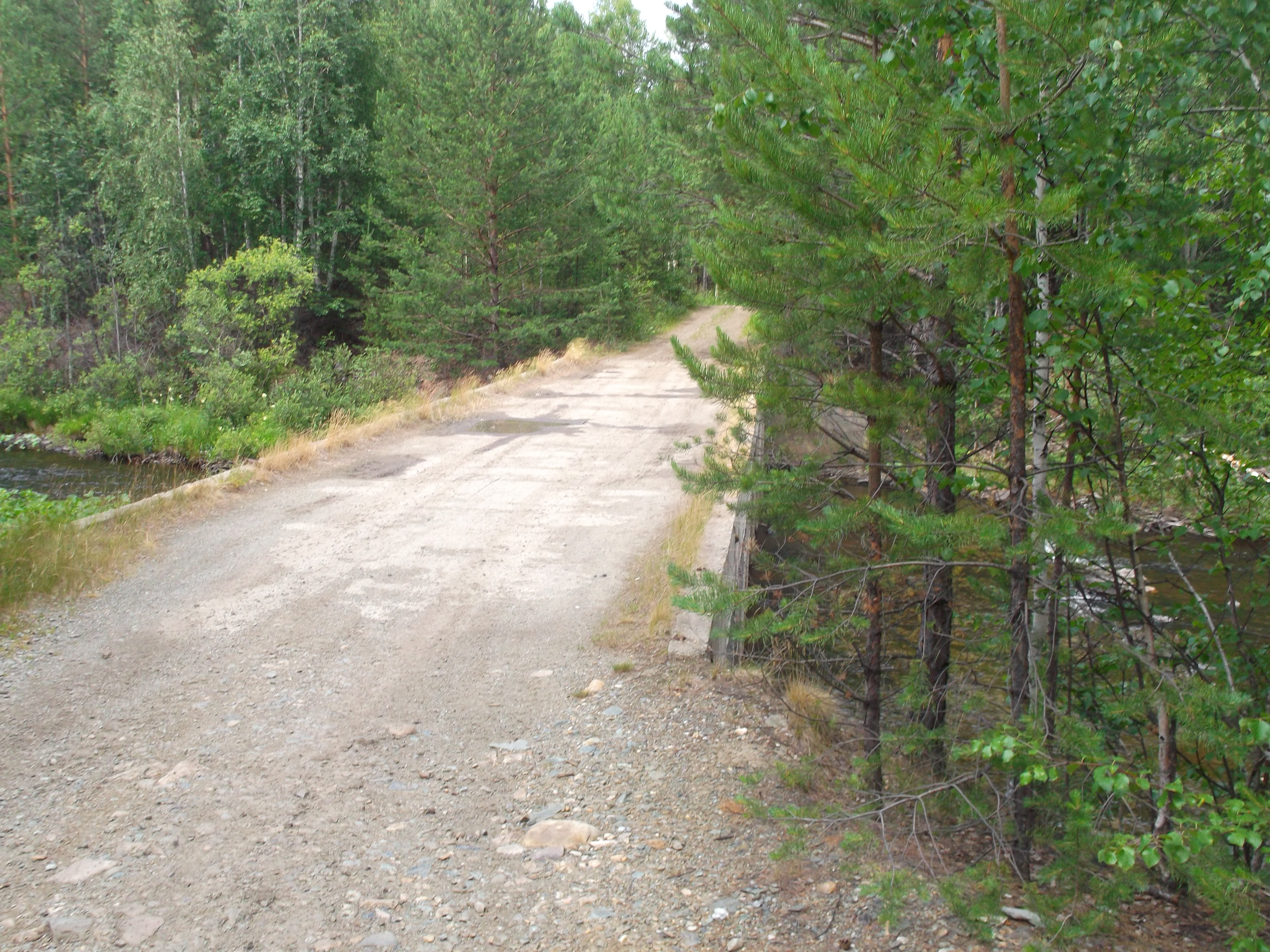 река Большой Киалим